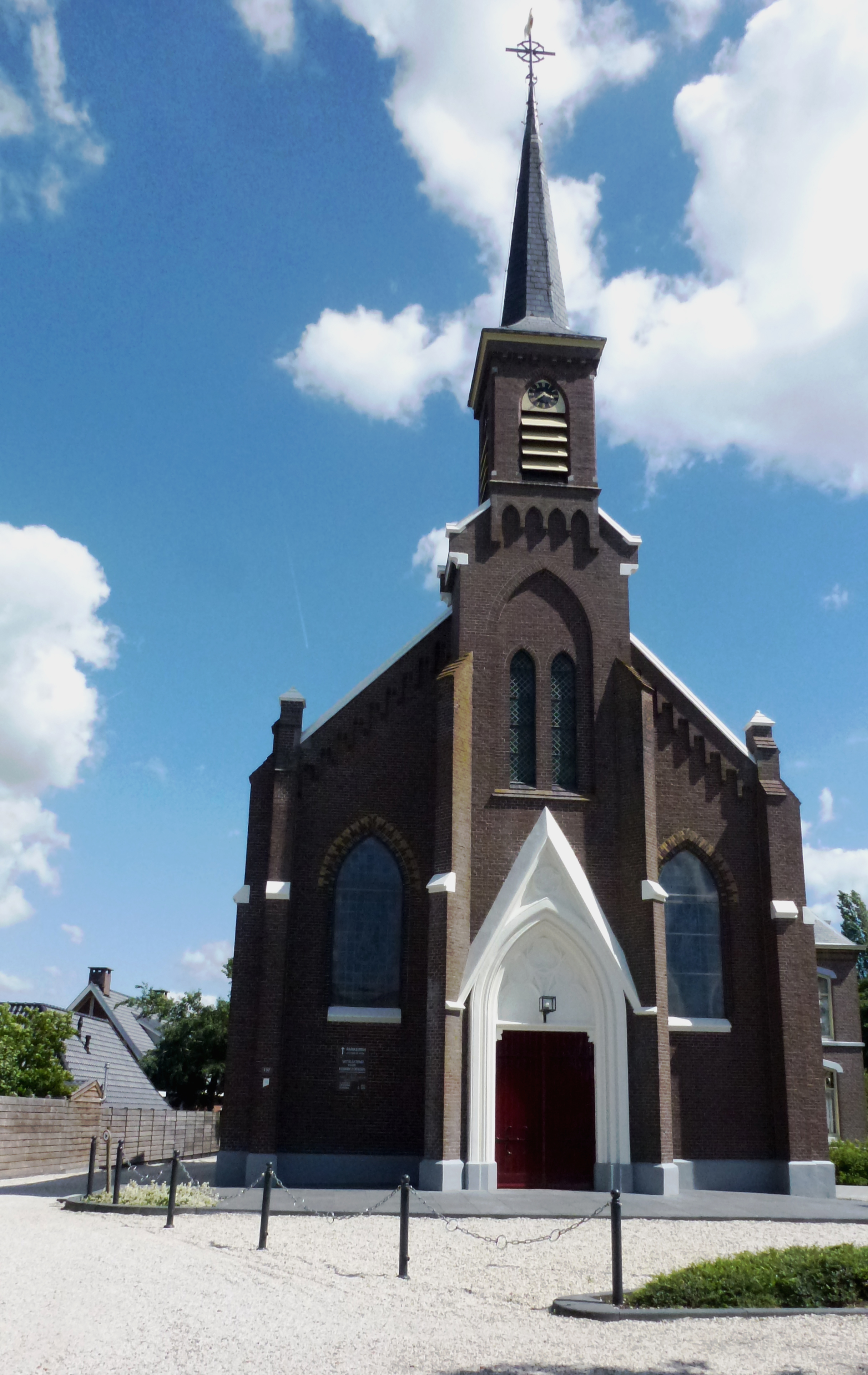 O.L.V. Geboortekerk (De Meije)